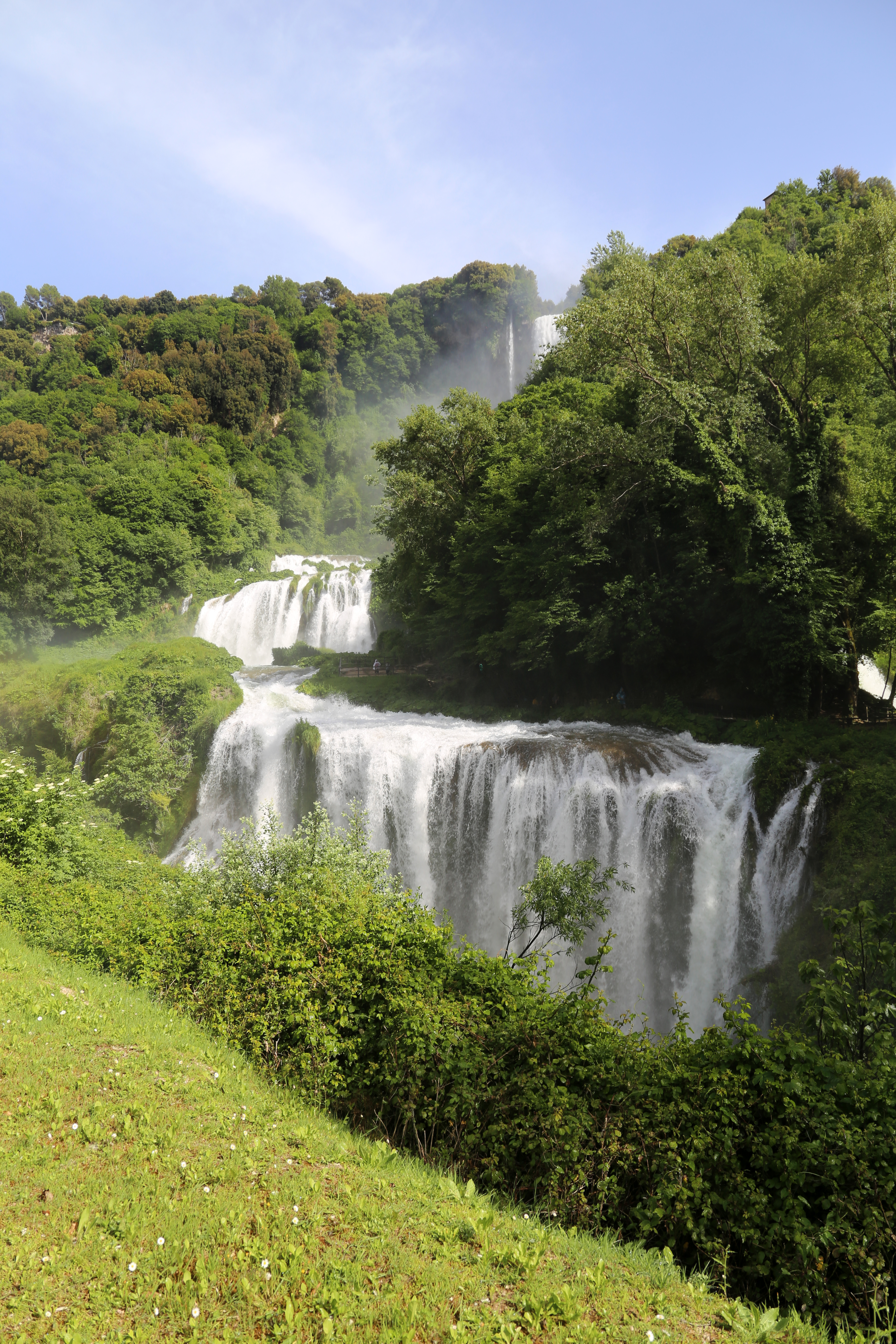 Cascata delle Marmore This is a photo of a monument which is part of cultural heritage of Italy.